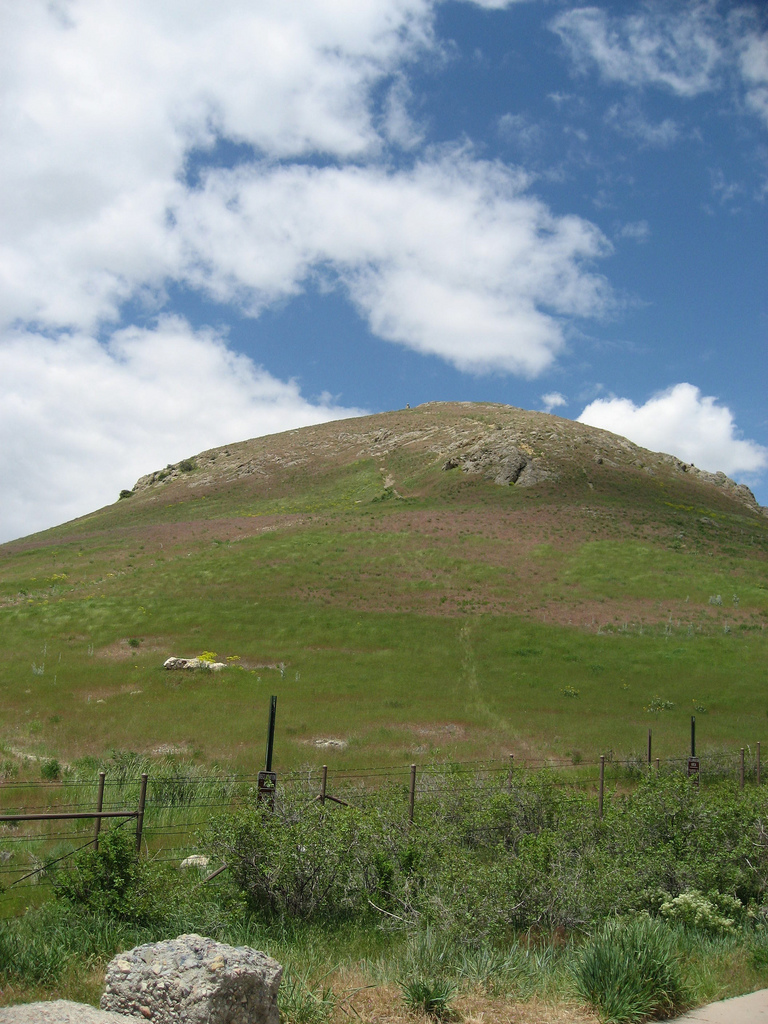 Ensign Peak